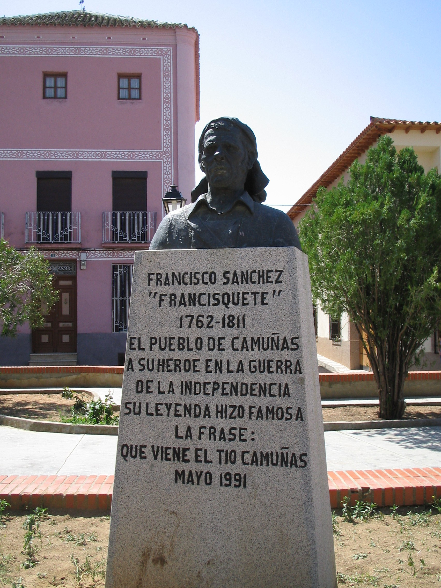 Estatua del Tio Camuñas en Camuñas